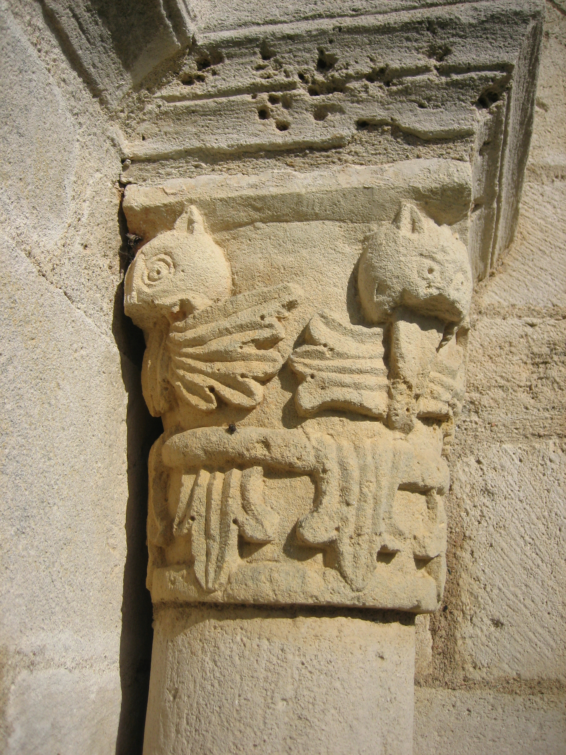 Église Saint-Martin de Montlouis (Cher). XIIe et XIIIe siècle, restauration au XIXe siècle